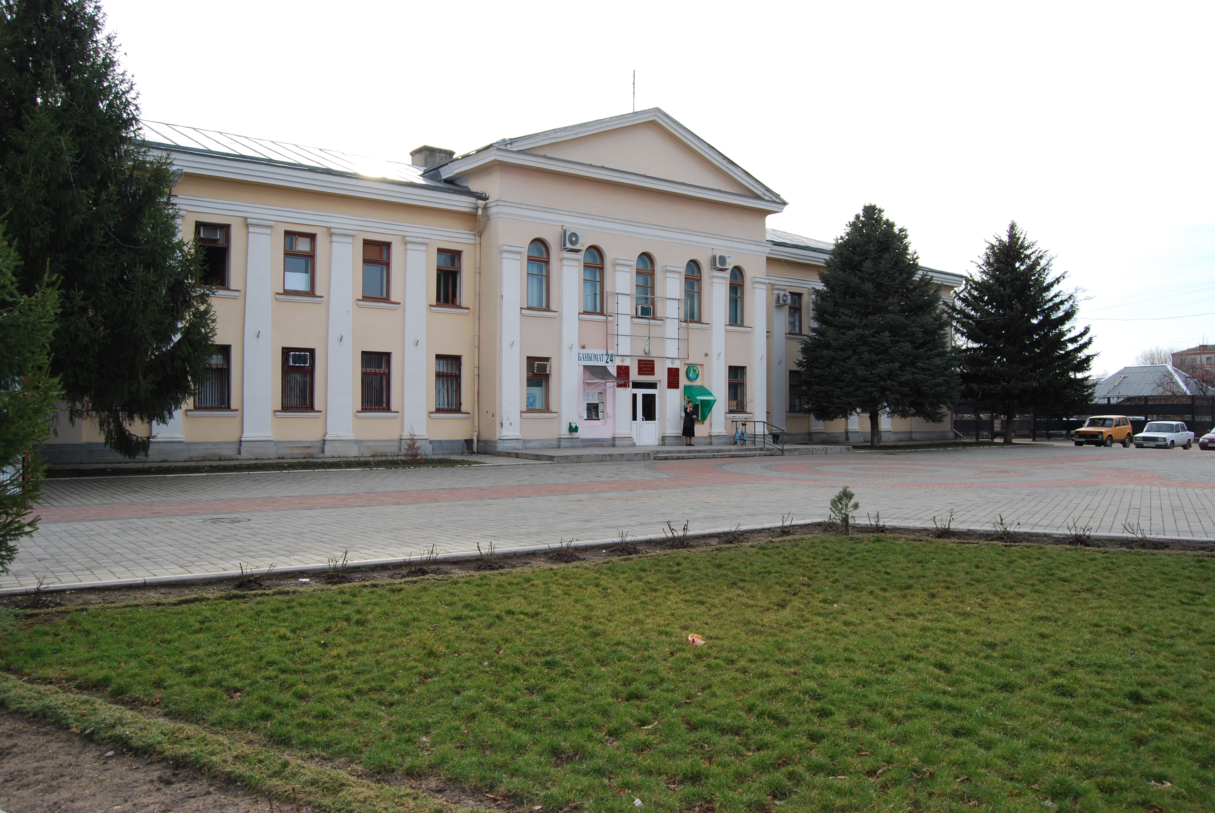 администрация